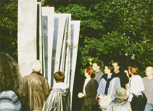 Skulptur des Künstlers Lutz Bernsau und Besucher bei der Eröffnung des Events "Belagerung" auf Burg Altena im Jahr 2000